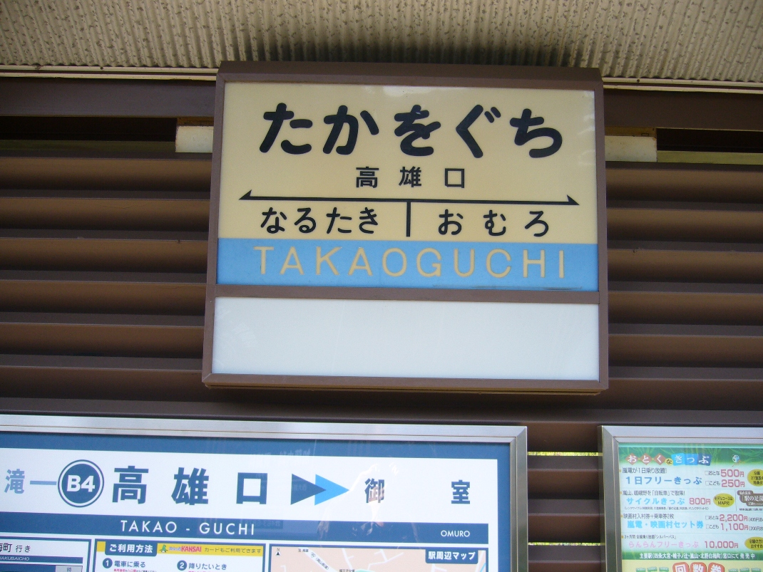 京福電気鉄道北野線高雄口駅の駅名票。「たかをぐち」になっていたのが特徴であったが、2007年3月19日に行われた駅名の変更で「宇多野駅」になったため、見られなくなった。なお、左下に少し見える時刻表や駅周辺地図等の書かれた案内板は、当時北野線で先行試用されていたラインカラーや駅ナンバリングが既に使用されている。2007年2月26日に投稿者が撮影。